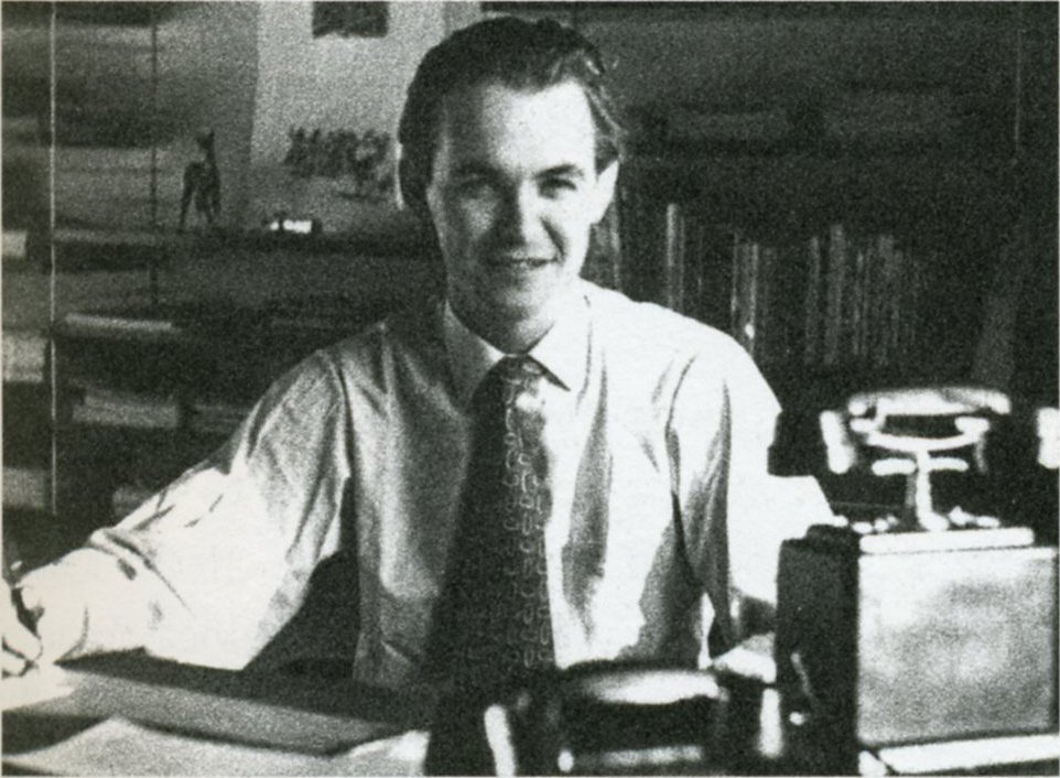 Rolf Janson 1950 på Serieförlaget (Åhlén & Åkerlund) i Stockholm. Bildtext i den tryckta källan från 2002: "Rolf Janson – nybliven Fantomenredaktör som fått de första glädjande försäljningsrapporterna på sin tidning[.]"